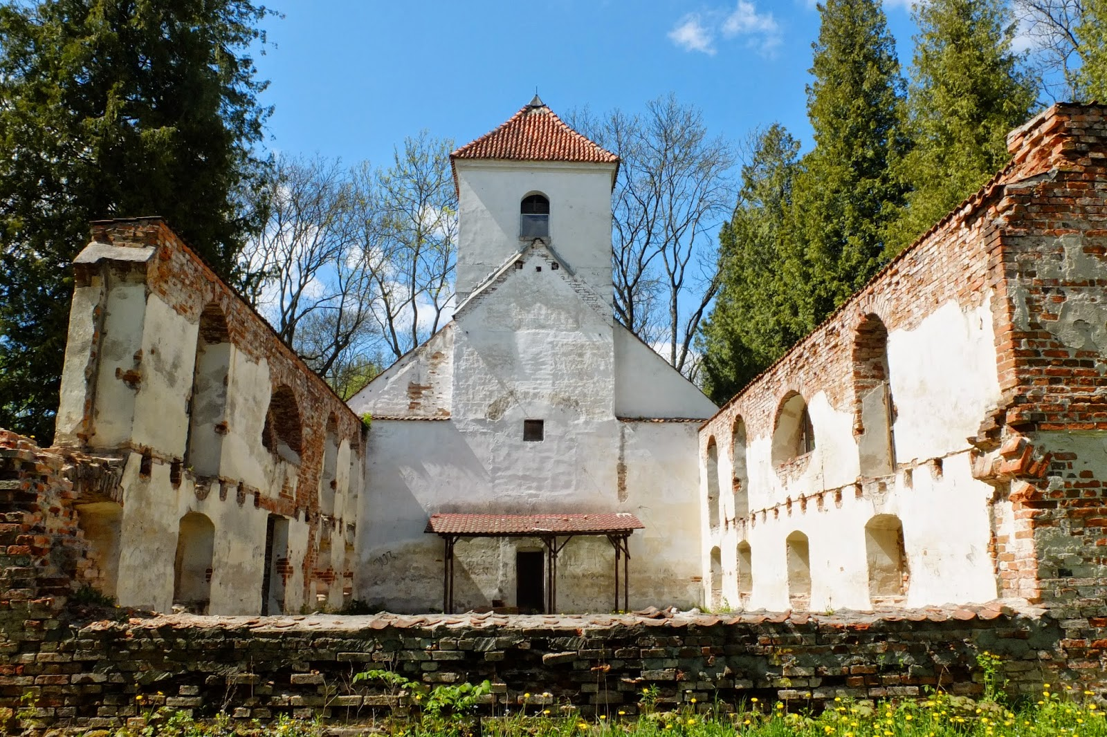 Kobułty - kościół ewangelicki - ruina